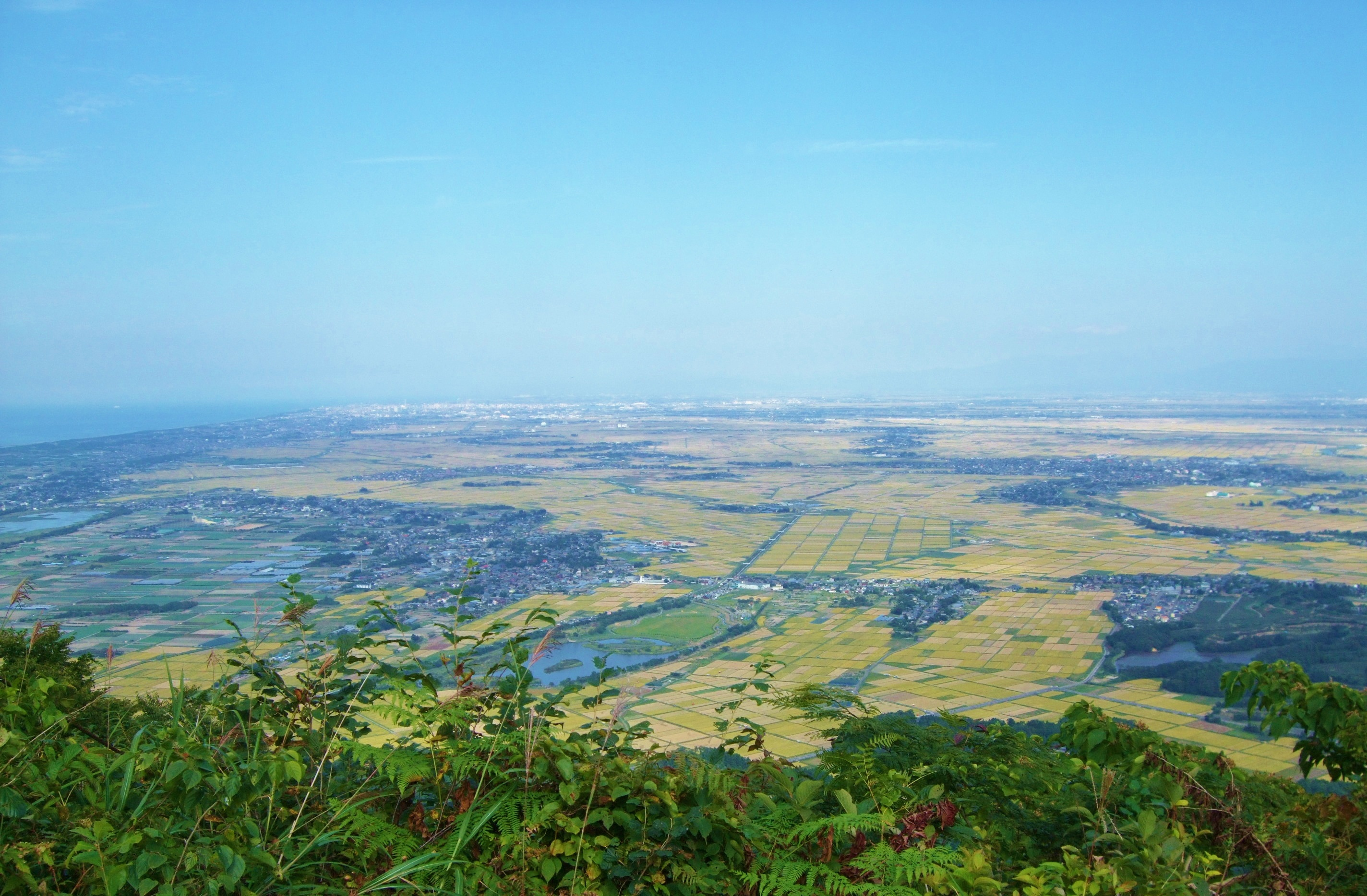 Echigo Plain seen from Mount Kaguda in Niigata, Japan. Looking ENE.